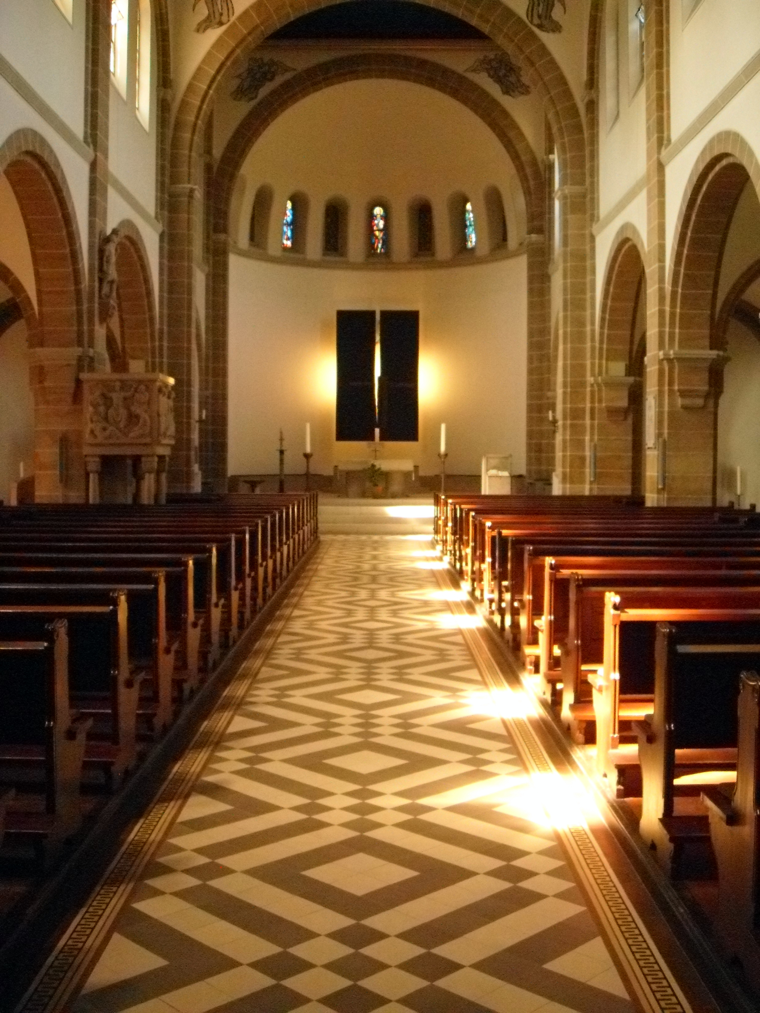 St. Raphael ist eine katholische Kirche im Heidelberger Stadtteil Neuenheim. Sie wurde in den Jahren 1903 bis 1905 im neuromanischen Stil errichtet und ist dem Erzengel Raphael geweiht.